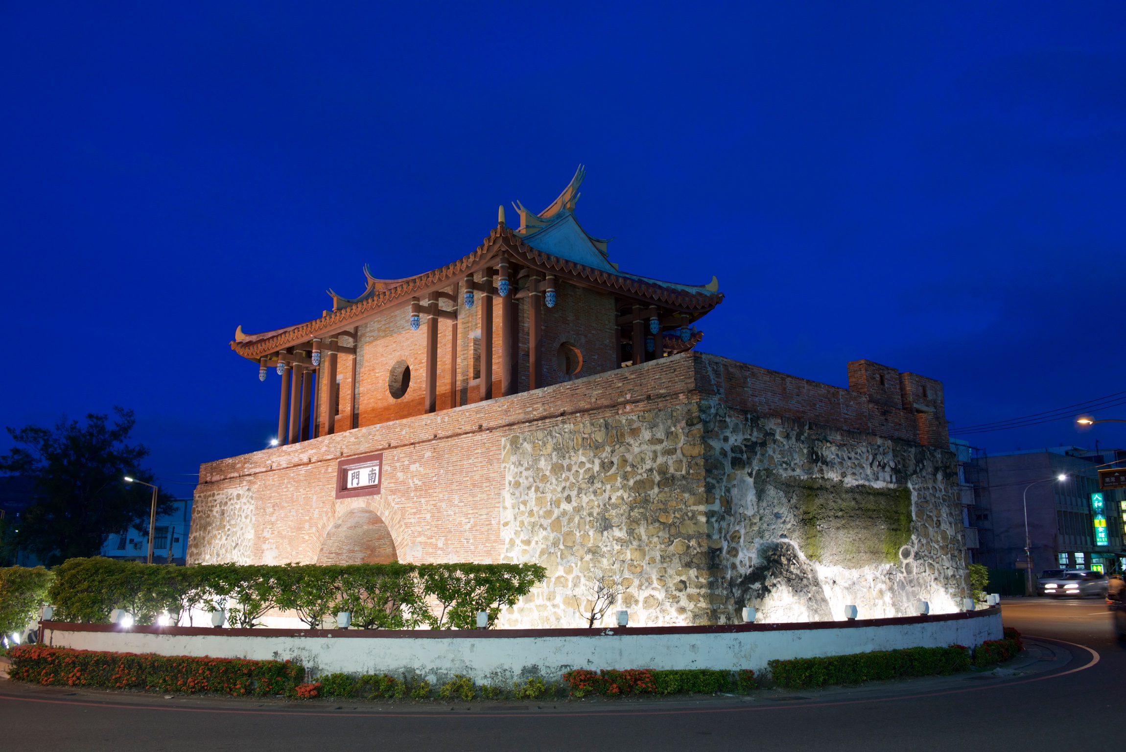 恆春南門